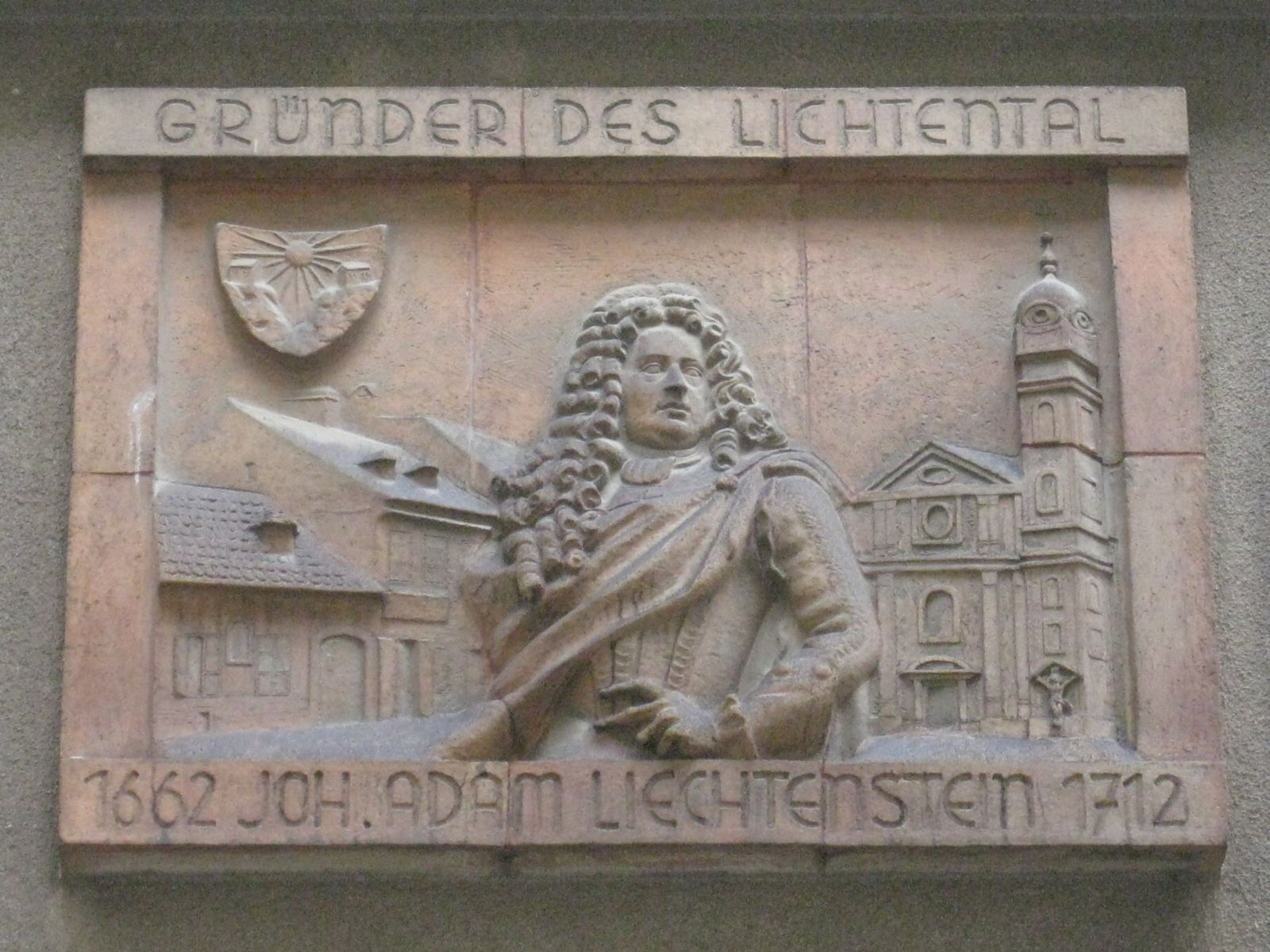 Gedenktafel zur Gründung der Ortschaft Lichtental durch Fürst Johann Adam Andreas von Liechtenstein auf dem Haus Salzergasse 12